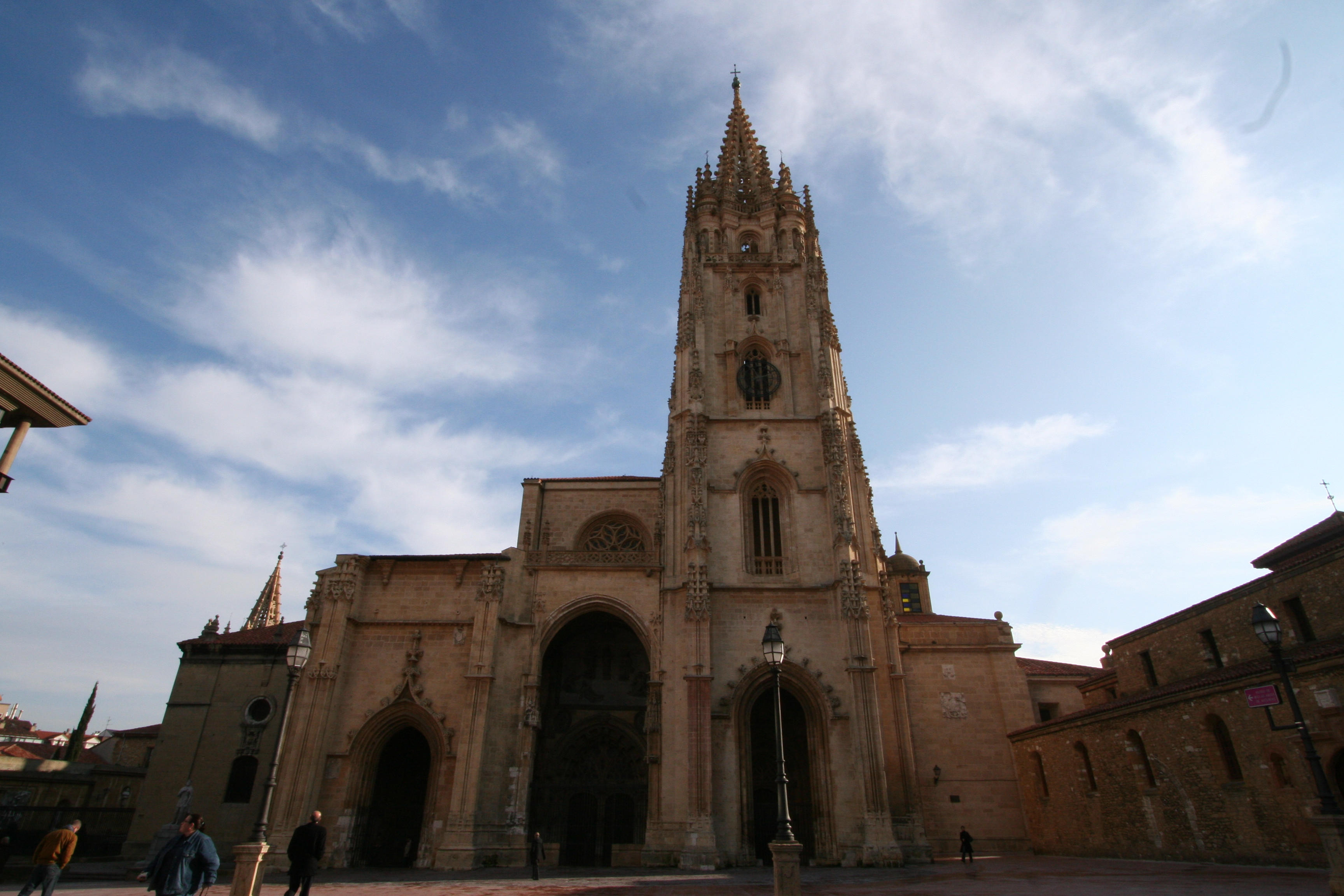 Imagen exterior de la catedral de Oviedo